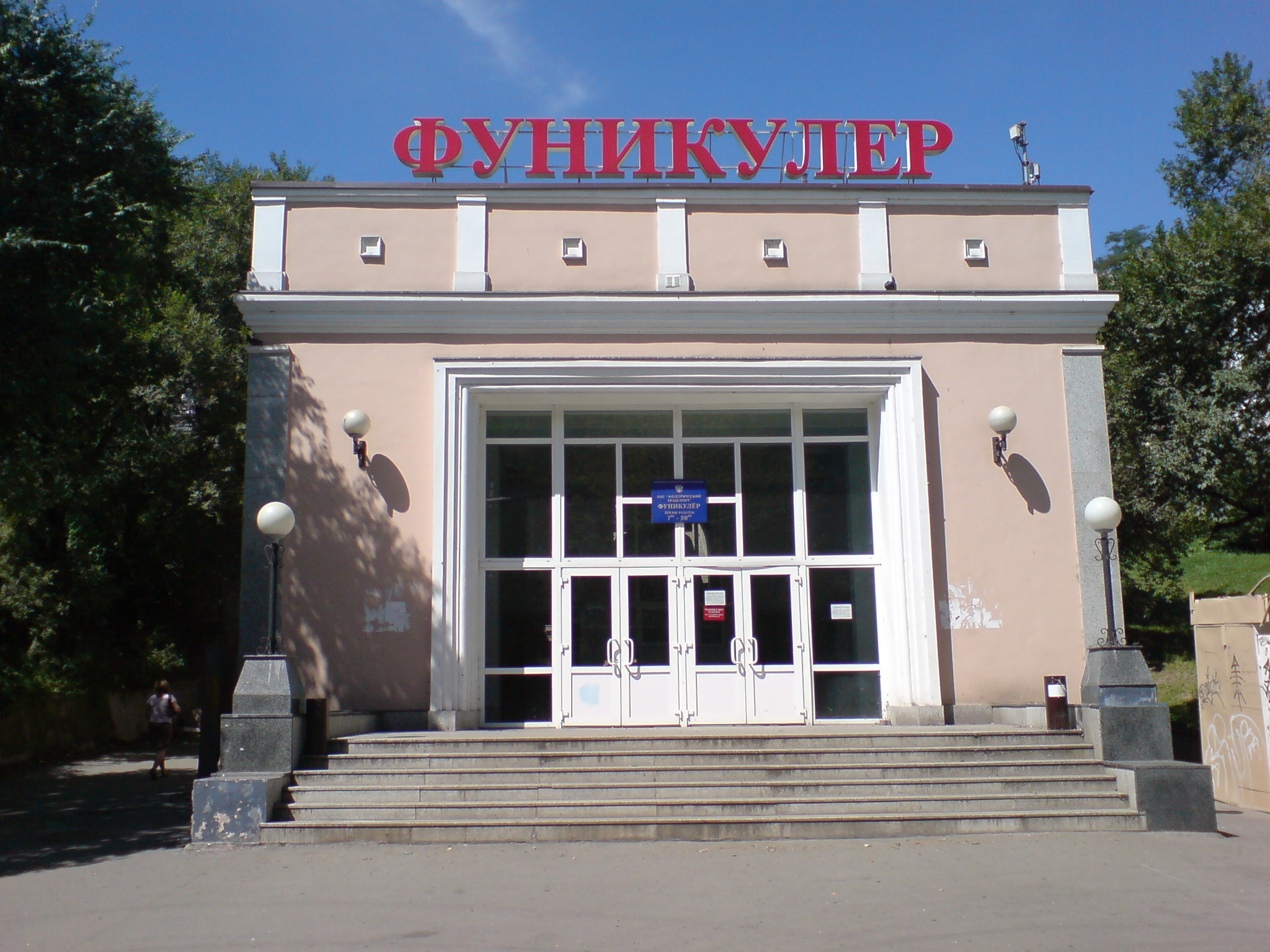 The lower station of Vladivostok funicular/Нижний вестибюль Владивостокского фуникулёра